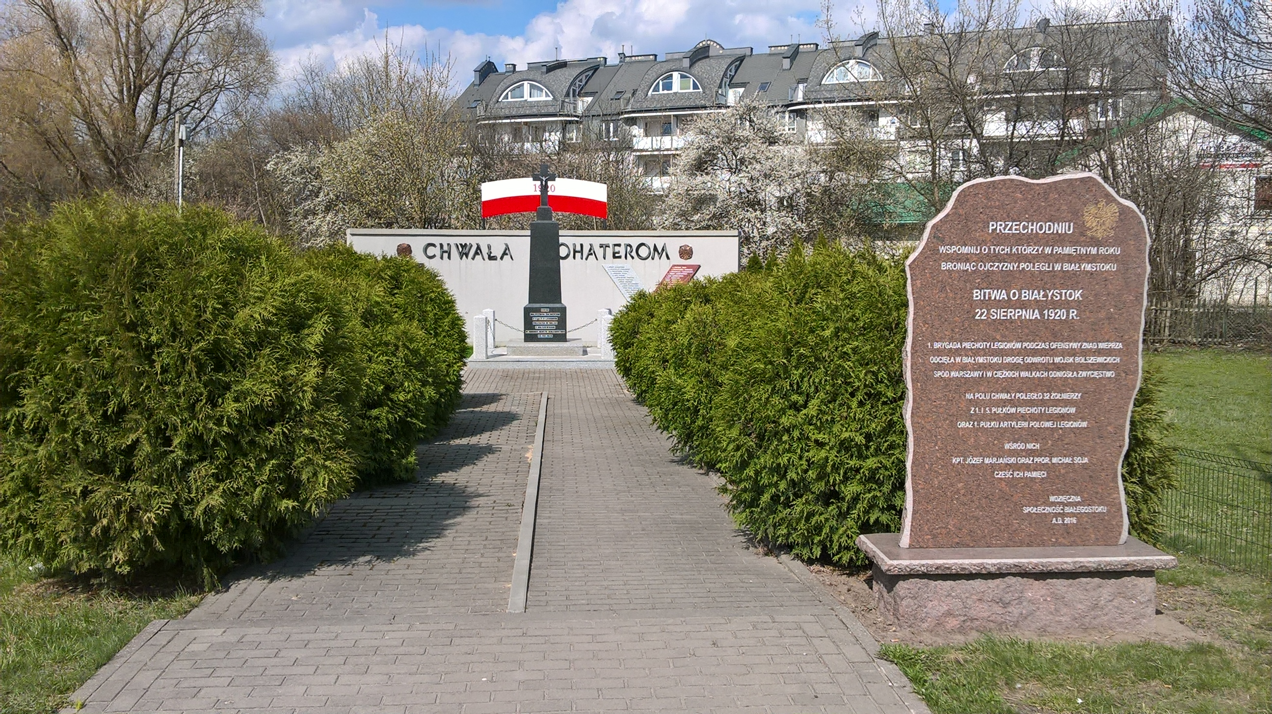 Pomnik poświęcony poległym żołnierzom 1. Pułku Piechoty Legionów podczas bitwy białostockiej w dniu 22 sierpnia 1920 r.